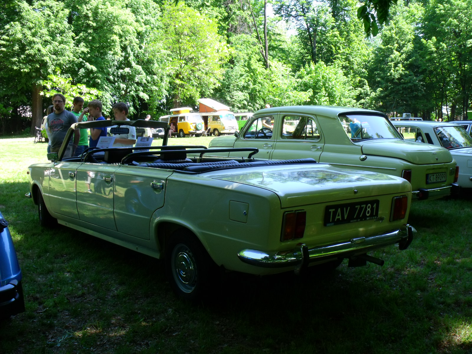 Polski Fiat 125p Long Cabrio z 1974 roku.